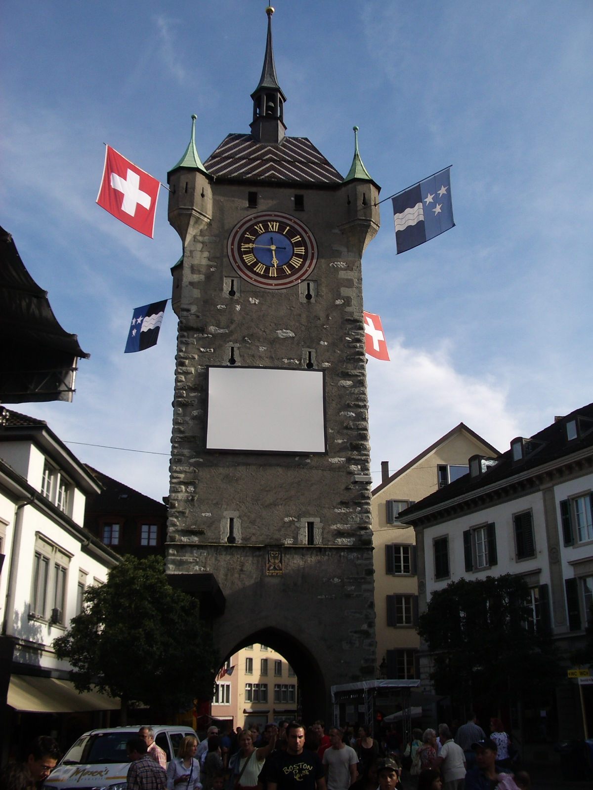 Baden AG, Switzerland